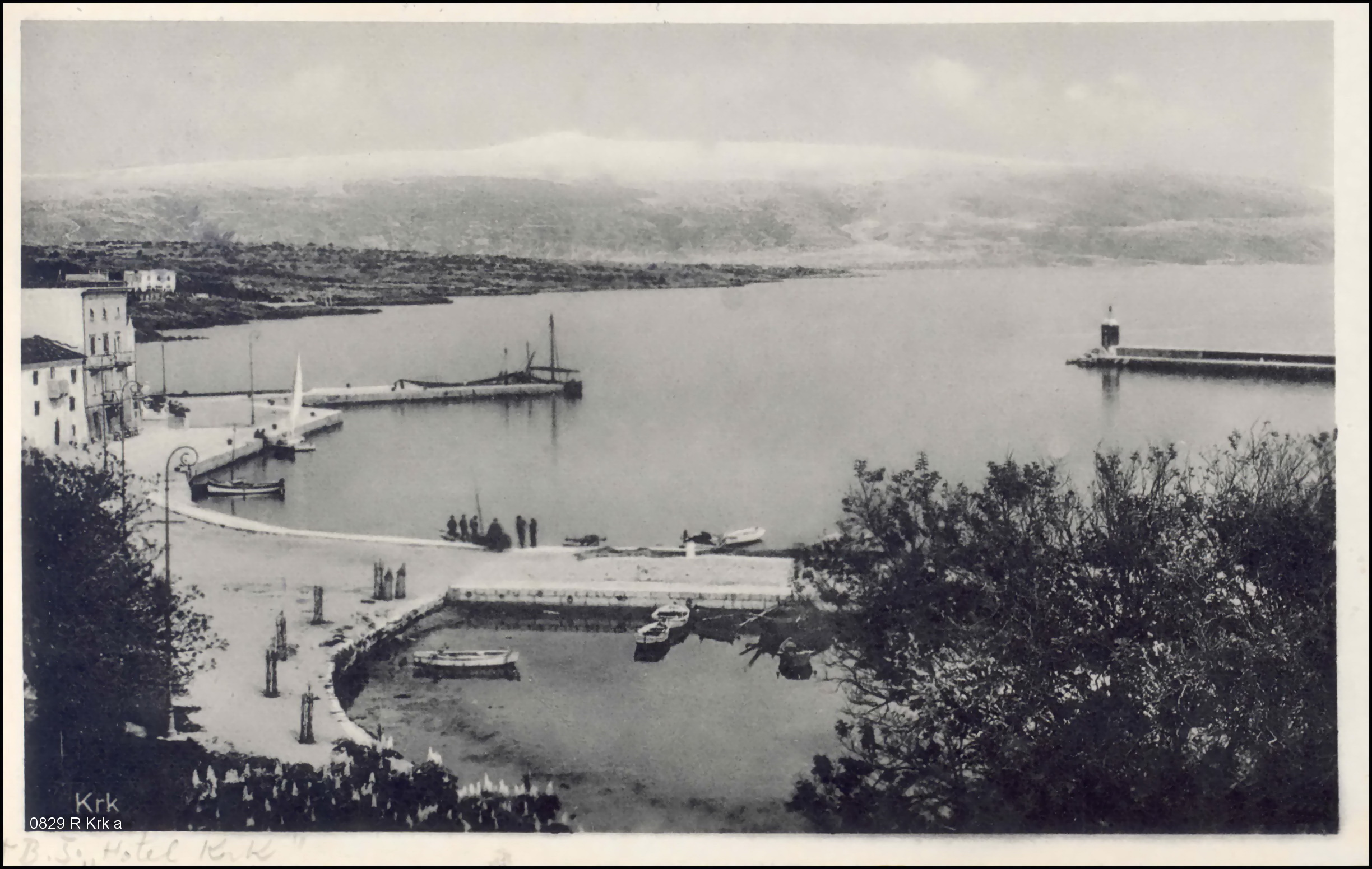 0829 R Krk a